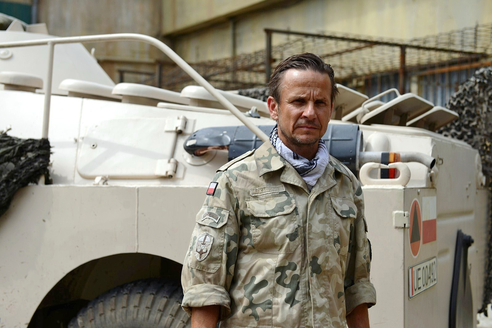 Bartłomiej Topa na planie filmu "Karbala".